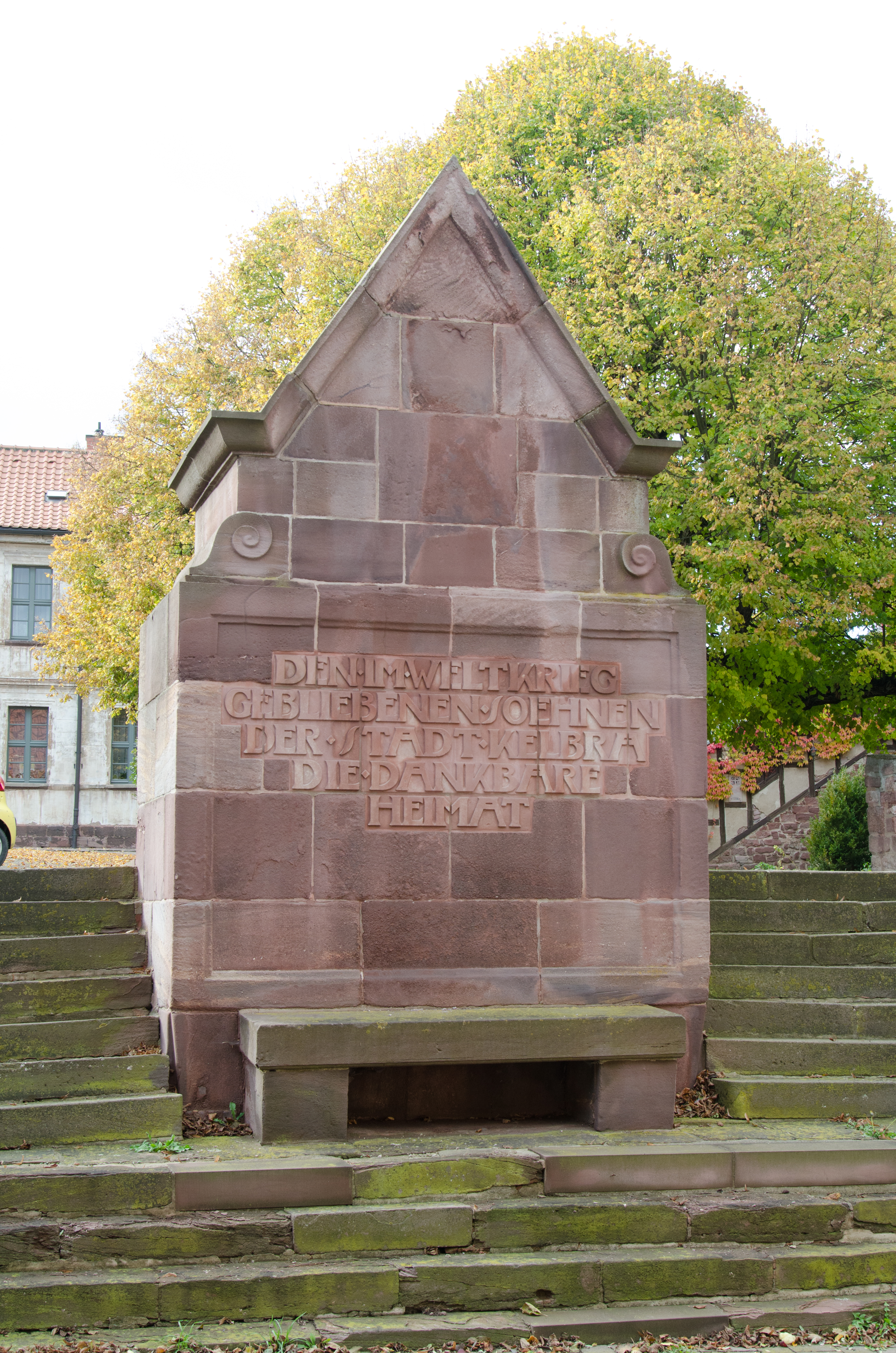 Kelbra, Marktstraße, Kriegerdenkmal